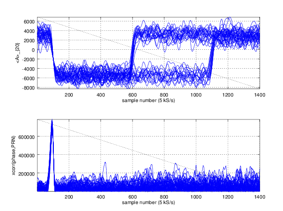 amplitude modulation and phase PRN cross-correlation timing capability comparison.